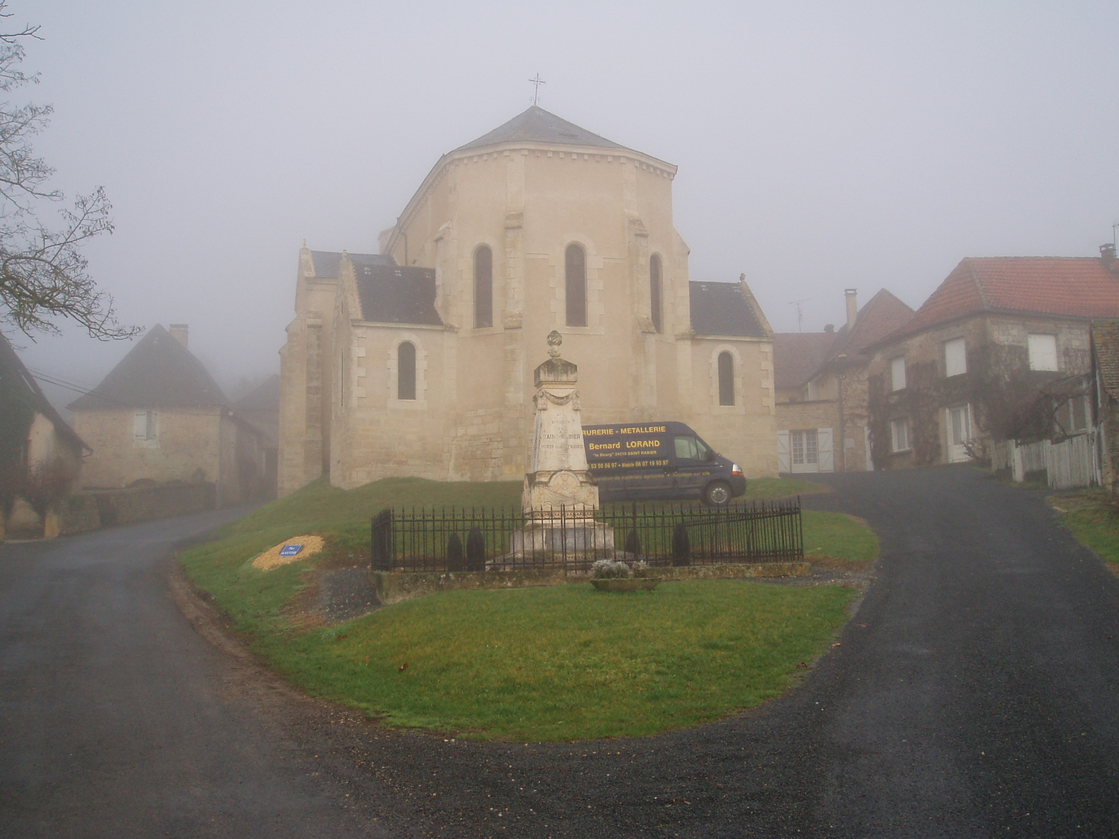 Village de Saint Rabier en Dordogne, église et place du Souvenir avec le monument aux morts de la guerre 14-18. Photo prise de la mairie.